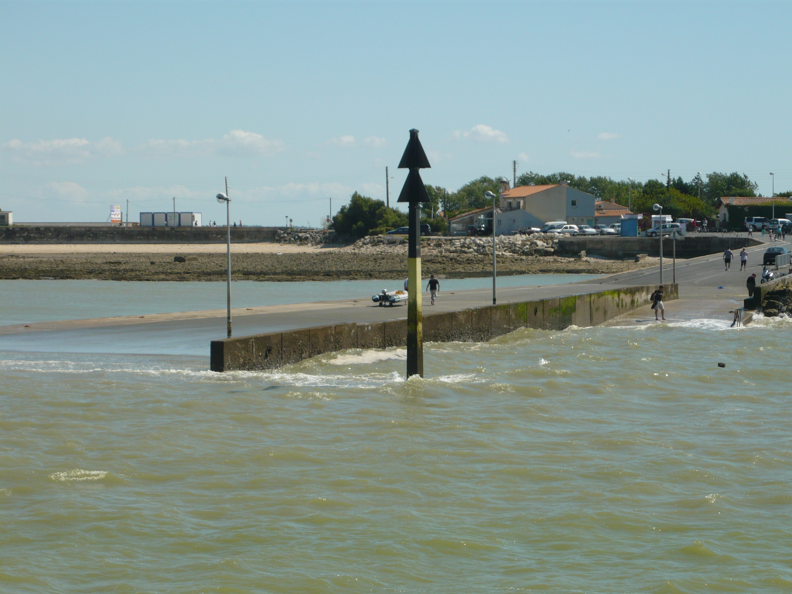 Le débarcadère de la Pointe de la Fumée, au nord-ouest de Fouras, à marée haute.